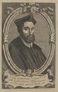 Scipione Forteguerri, acquaforte